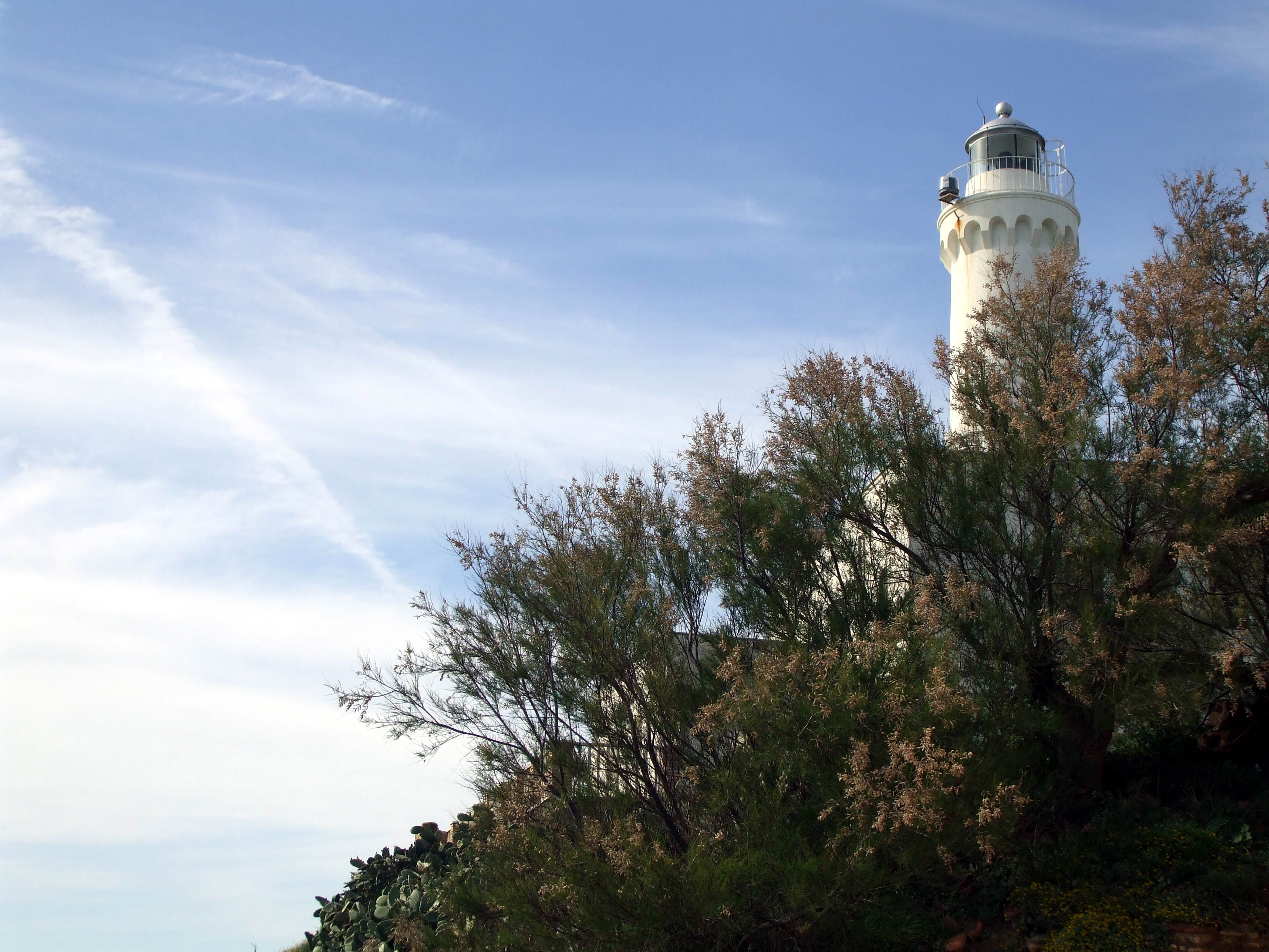 Anzio, il faro